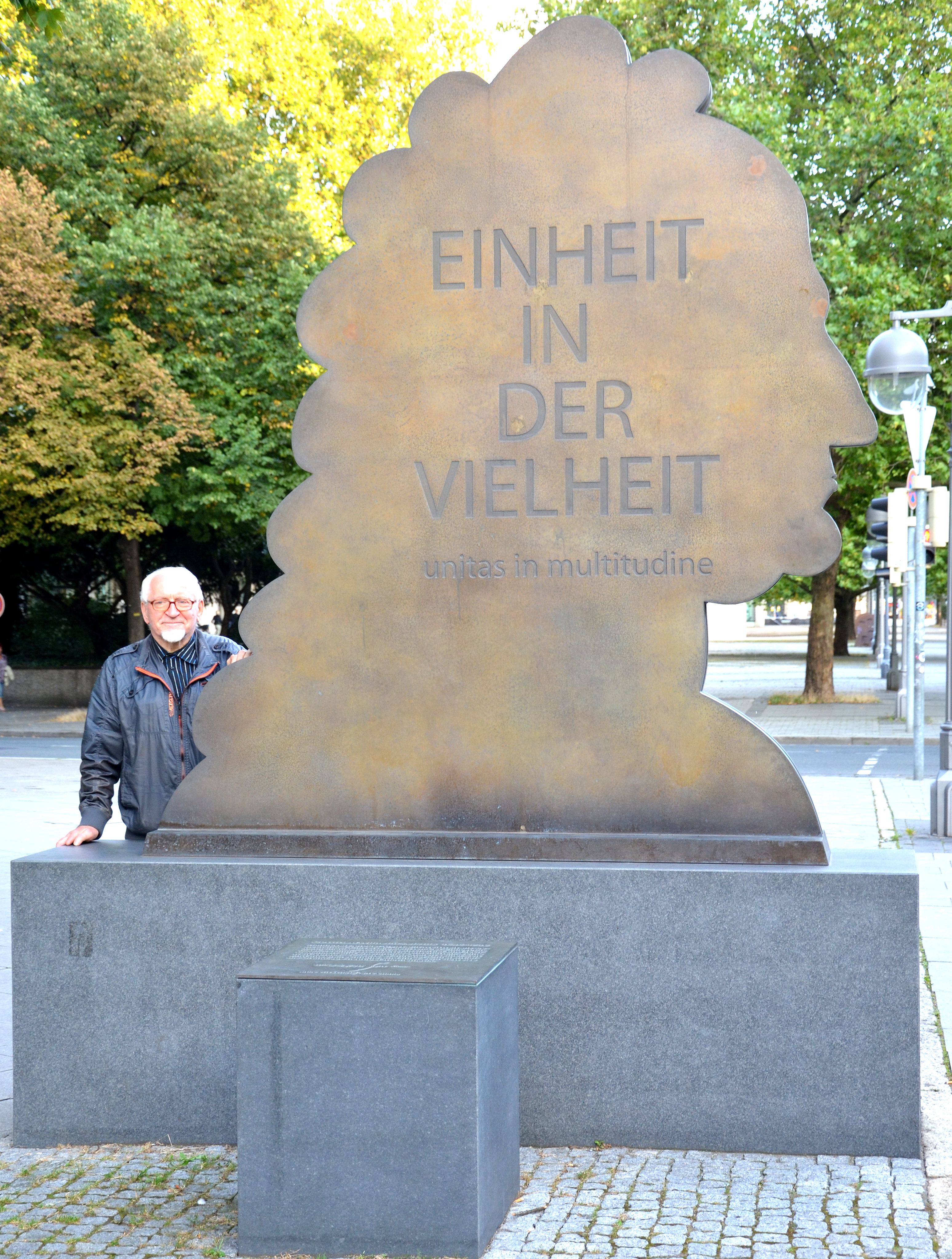 Der Dipl-Ing. Helmut Konietzny amv on Friedrich Oehler initiierten und von 2008 von dem Bildhauer Stefan Schwerdtfeger geschaffenen, von der Bildgießerei H. Noak gegossenen Leibniz-Denkmal in Hannover, am Opernplatz in der Georgstraße Ecke Georgsplatz ...